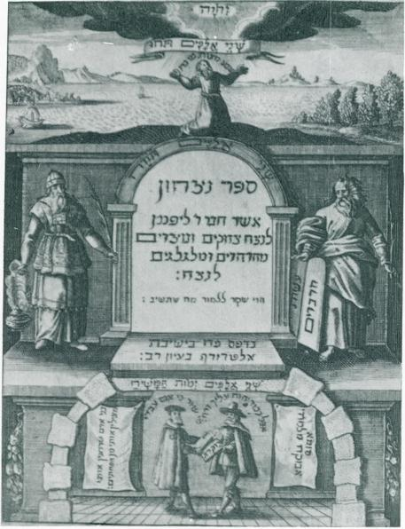 ספר הנצחון של רבי יום טוב ליפמן מילהויזן